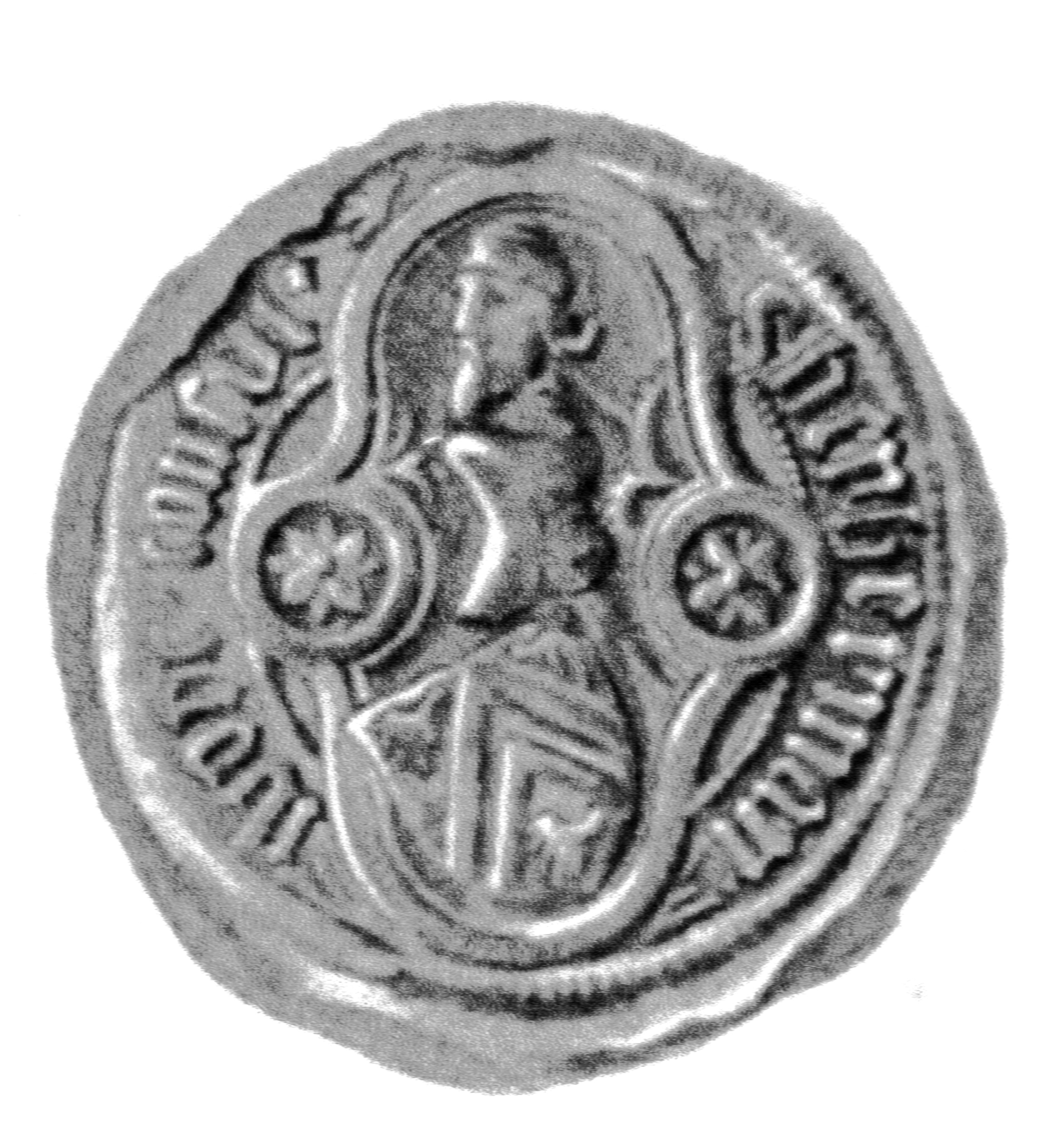 Siegel des Ratsmannes Hermann Iborg. Das Siegel stammt aus der Zeit um 1408. Siehe Emil Ferdinand Fehling: Lübeckische Ratslinie, Nr. 417 (Hermann Iborg).